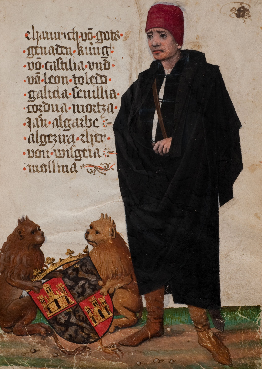 Miniatura que representa al rey Enrique IV de Castilla (1425-1474), apodado el Impotente e hijo del rey Juan II de Castilla y de la reina María de Aragón, la primera esposa de su padre. A su muerte fue sucedido en el trono castellano por su hermanastra, la reina Isabel I de Castilla.